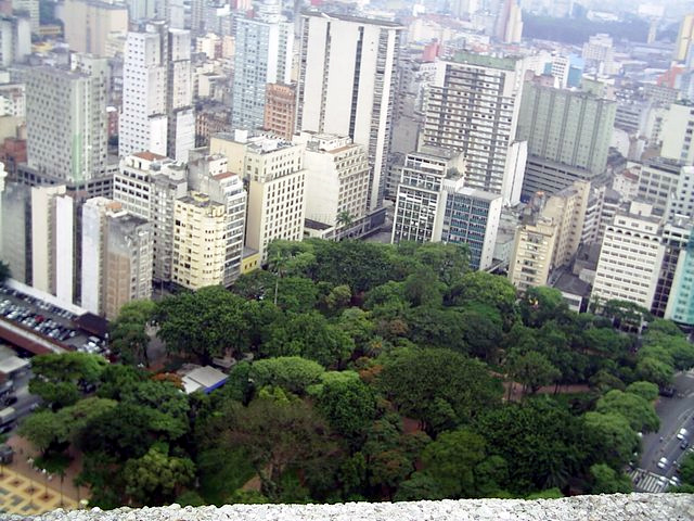 República Town Square, in downtown of São Paulo City. Praça da República, no centro de São Paulo.